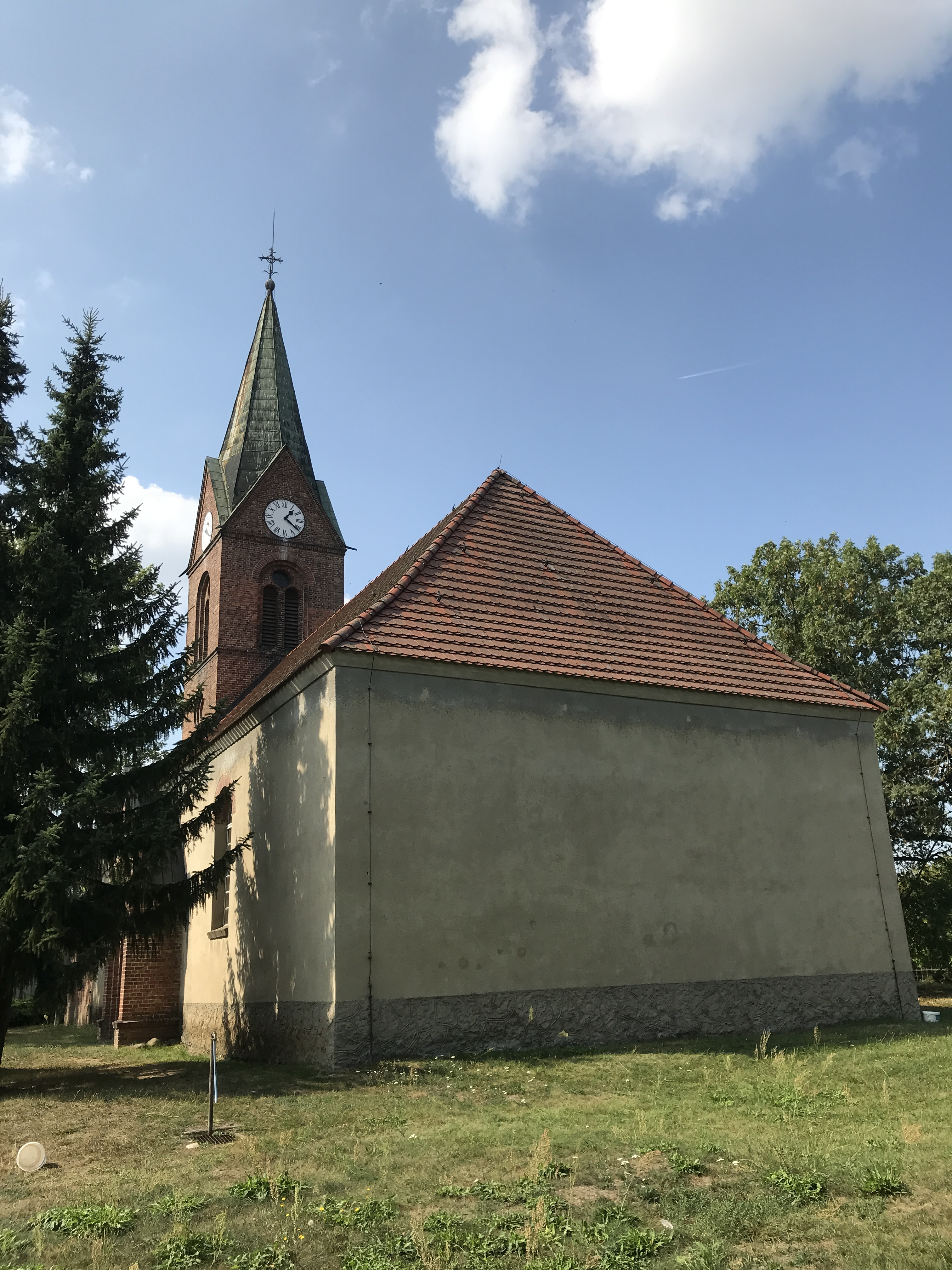 Die Saalkirche in Buchholz der Gemeinde Steinhöfel ist ein mittelalterlicher Bau, der aus Feldsteinen errichtet wurde. Im 18. Jahrhundert wurde die Kirche durchgreifend erneuert. Im Innern steht unter anderem eine barocke Kanzel aus dem Anfang des 18. Jahrhunderts.